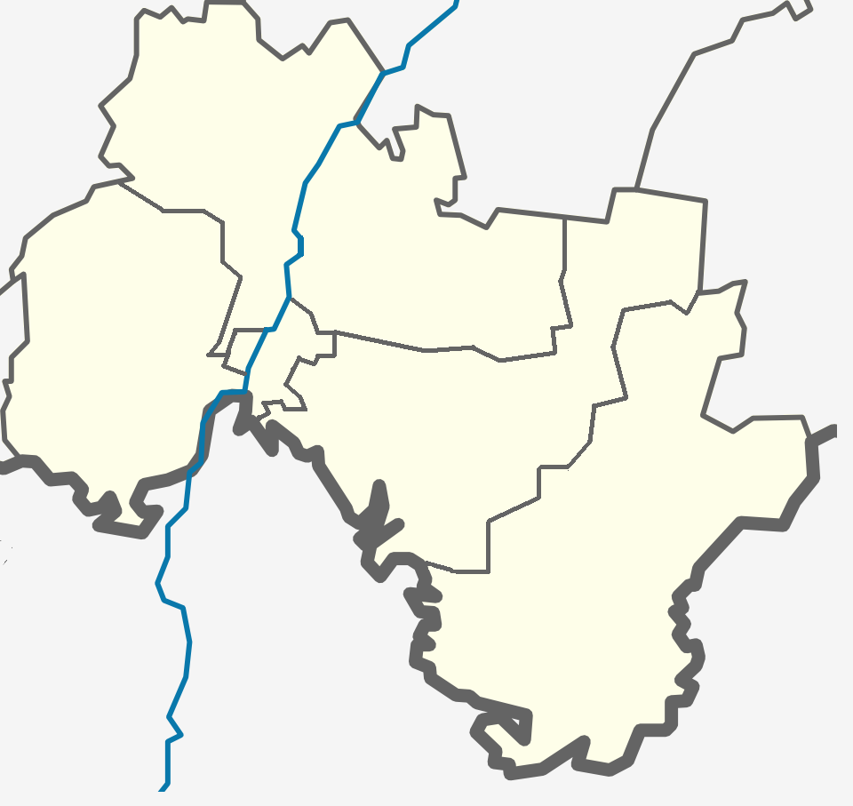 Карта Киришского района Ленинградской области с делением на муниципальные образования.